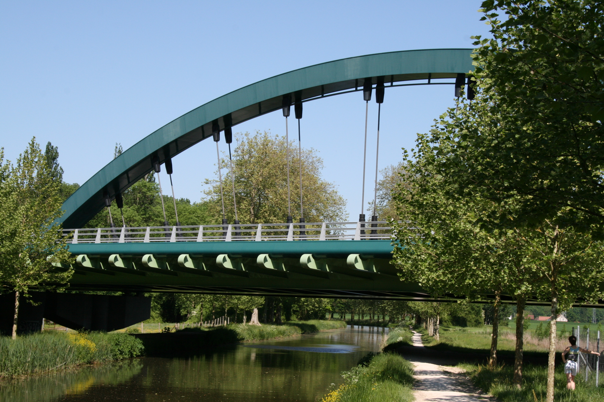 Viaduc de Pannes – pont en arc bowstring et ouvrage d’accès en bipoutre métallique. Franchit le Canal d’Orléans et la Bézonde – Département du Loiret (France)